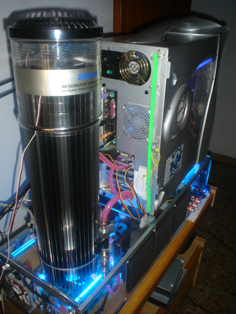 la part de darrera del ordinador on podem veure el dipossit de l'aigua